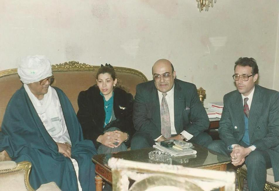 فرج فودة و جعفر النميري